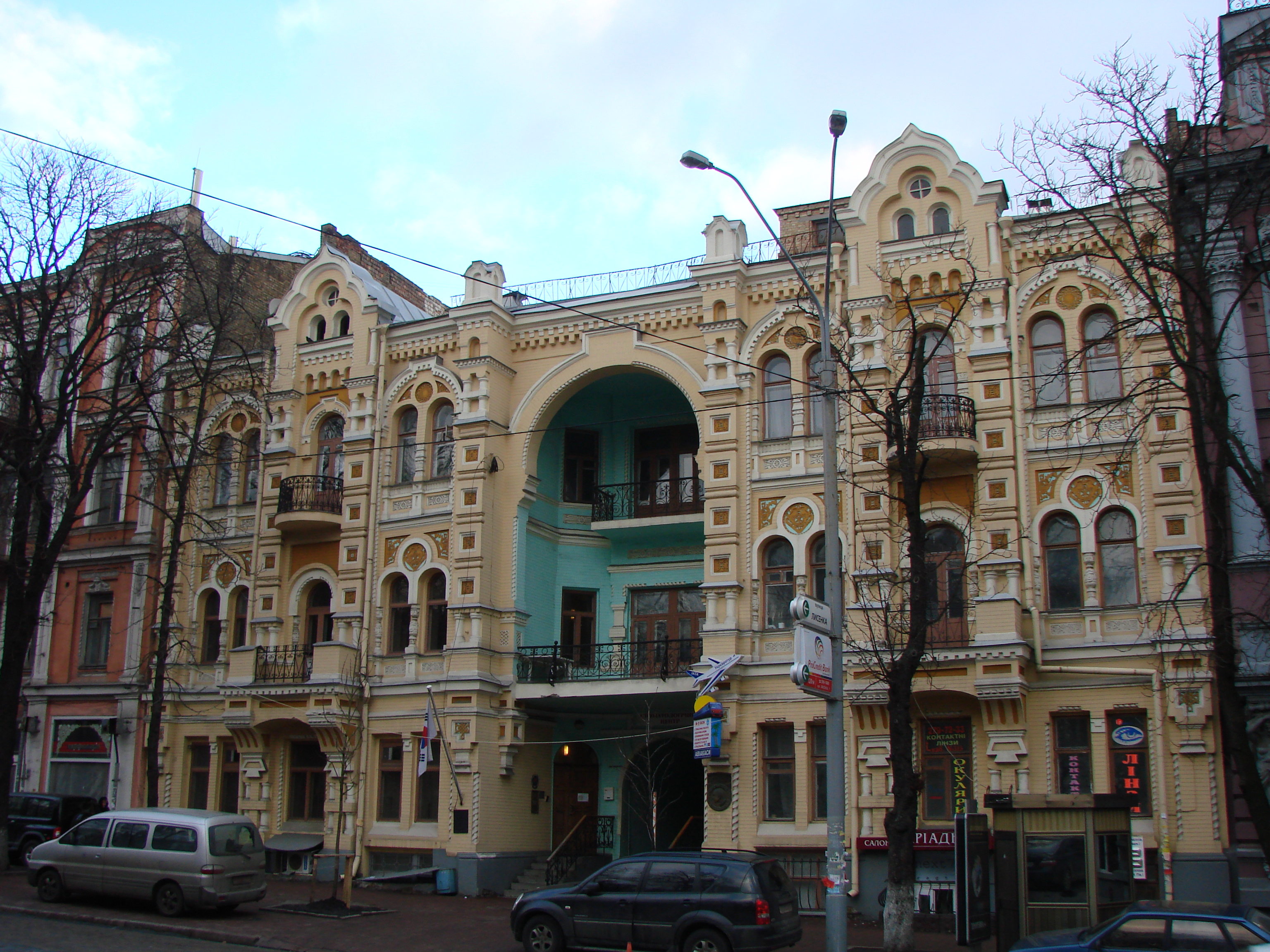 будинок Володимирська,43